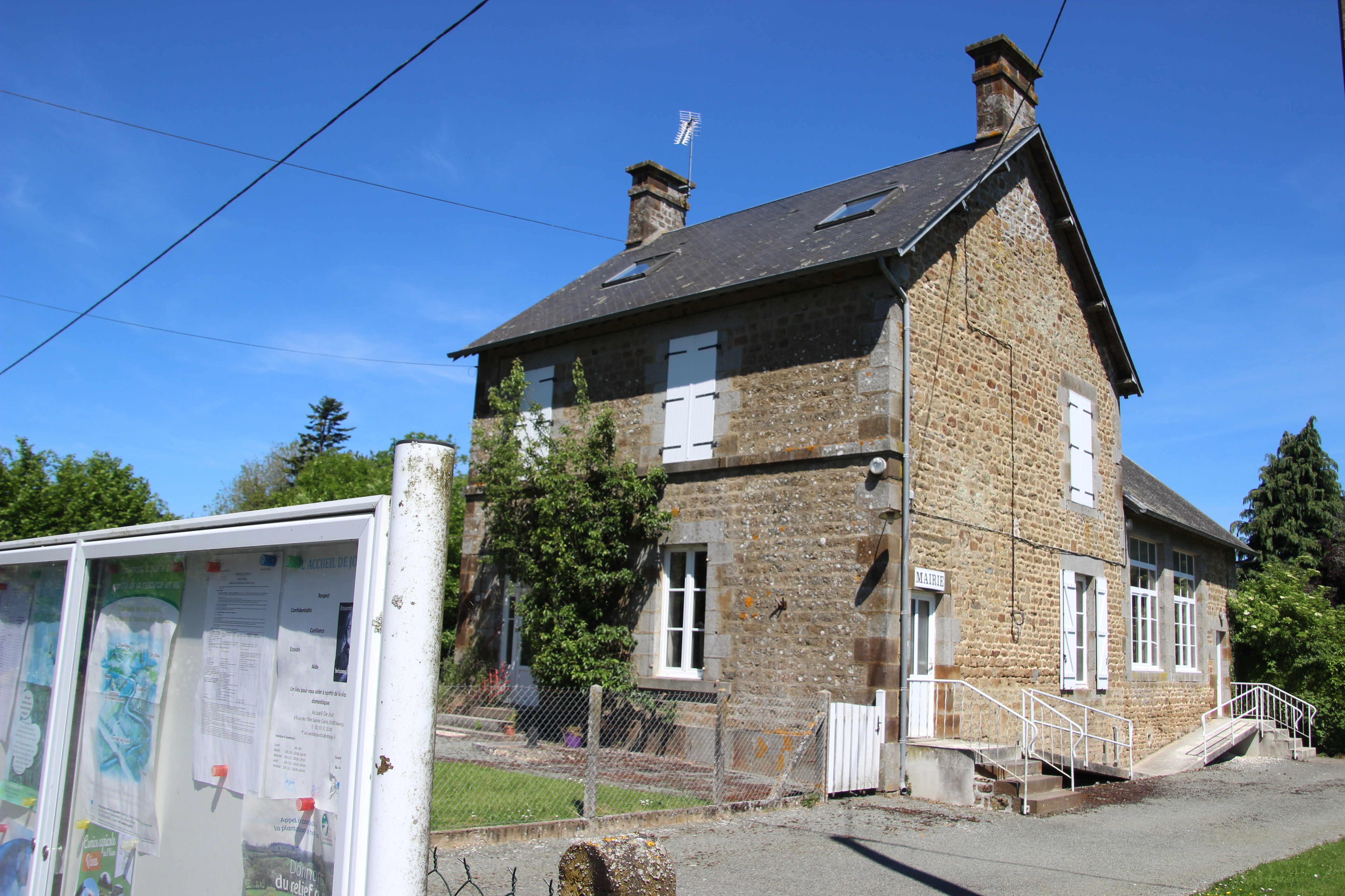 Mairie de La Chaux 61